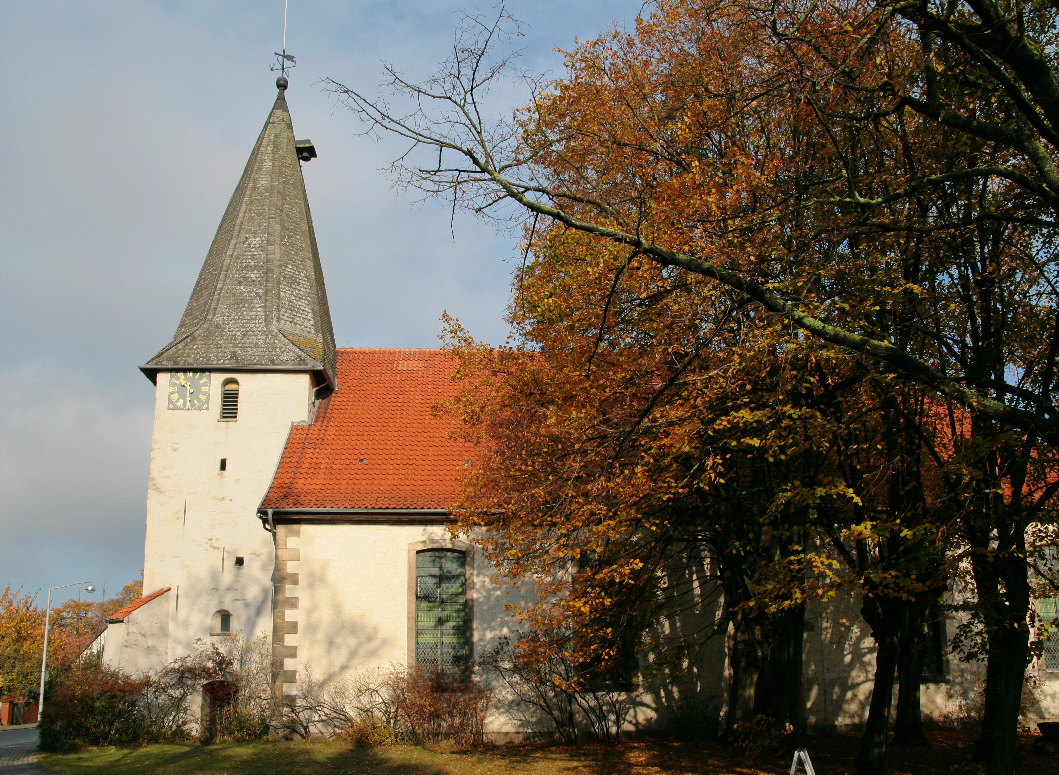 St.Martins-Kirche von 1196 in Engelbostel (Langenhagen) - die Mutter aller Kirchen der Region.